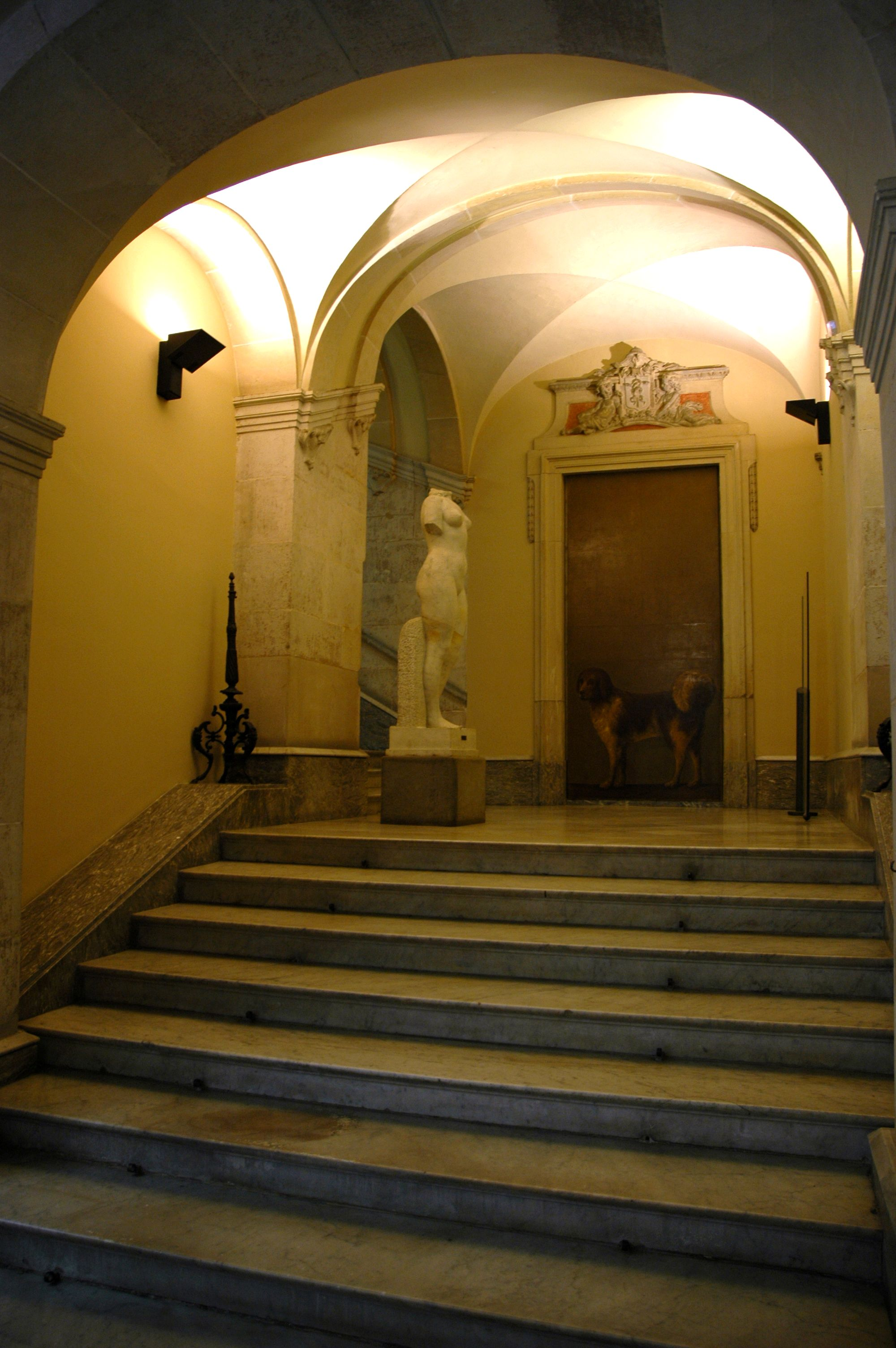 Escalinata del Palau Moja